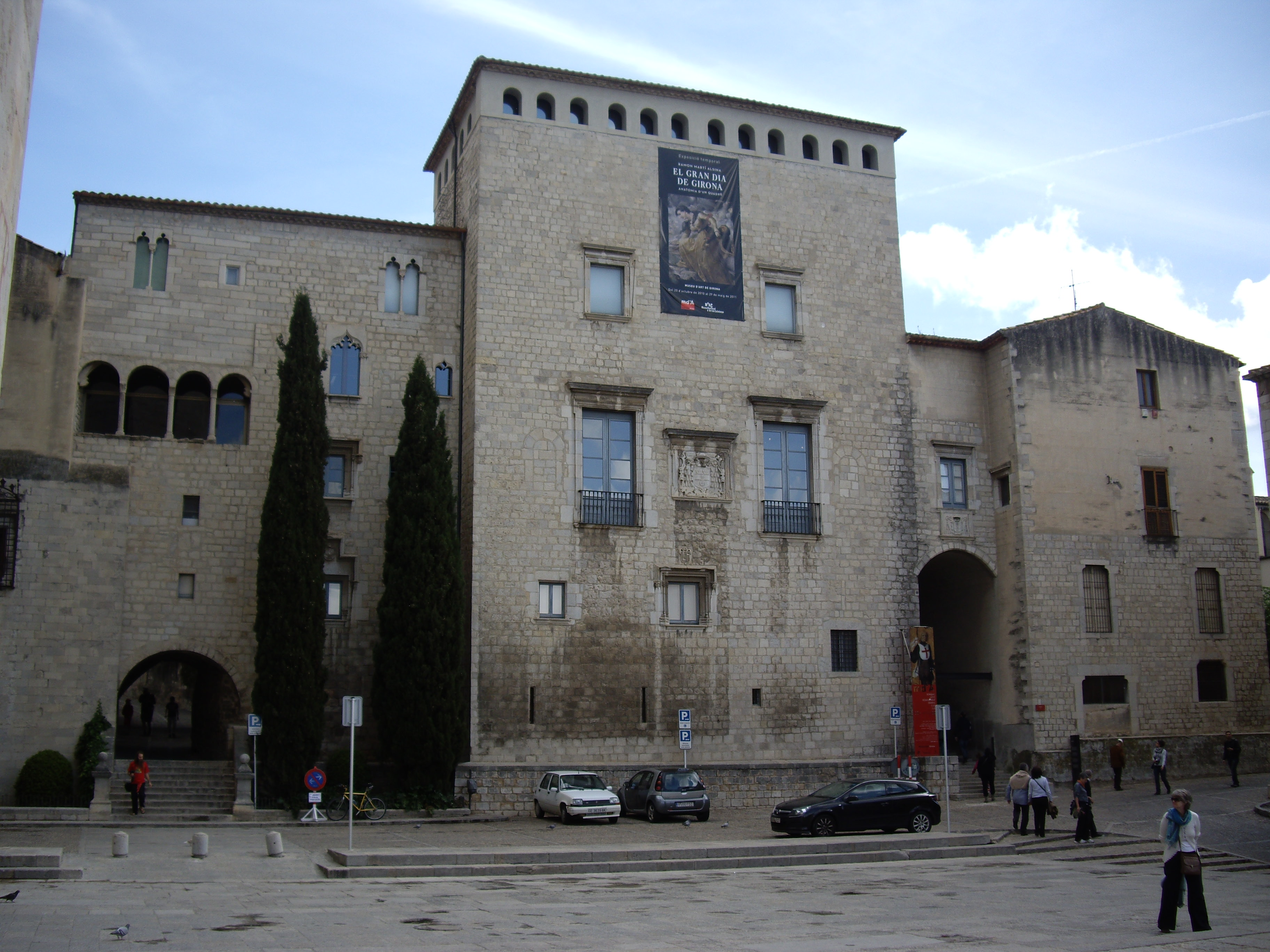 Façana Palau Episcopal, Museu d'Art de Girona.